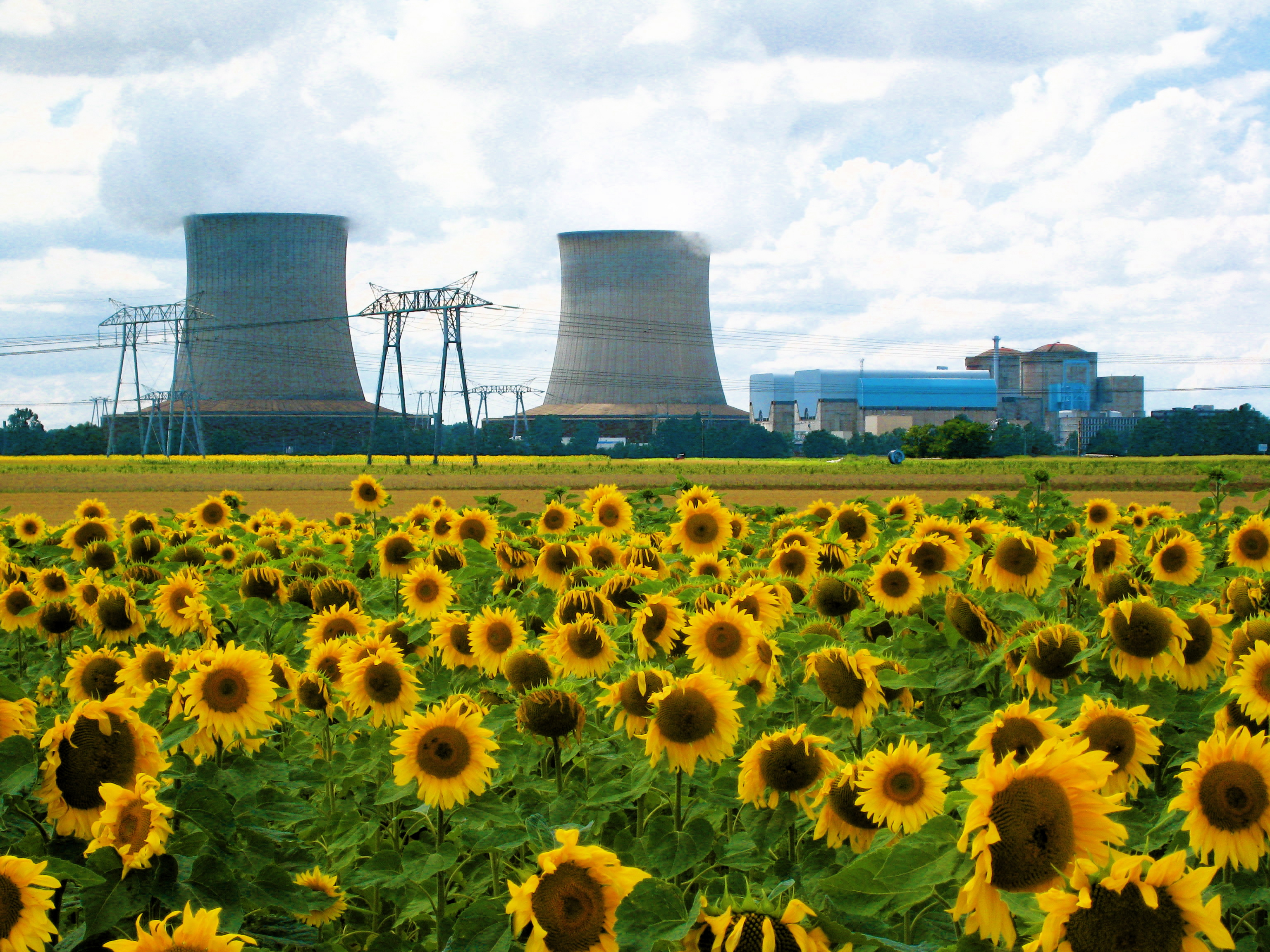 Centrale nucléaire de Saint Laurent des Eaux, France